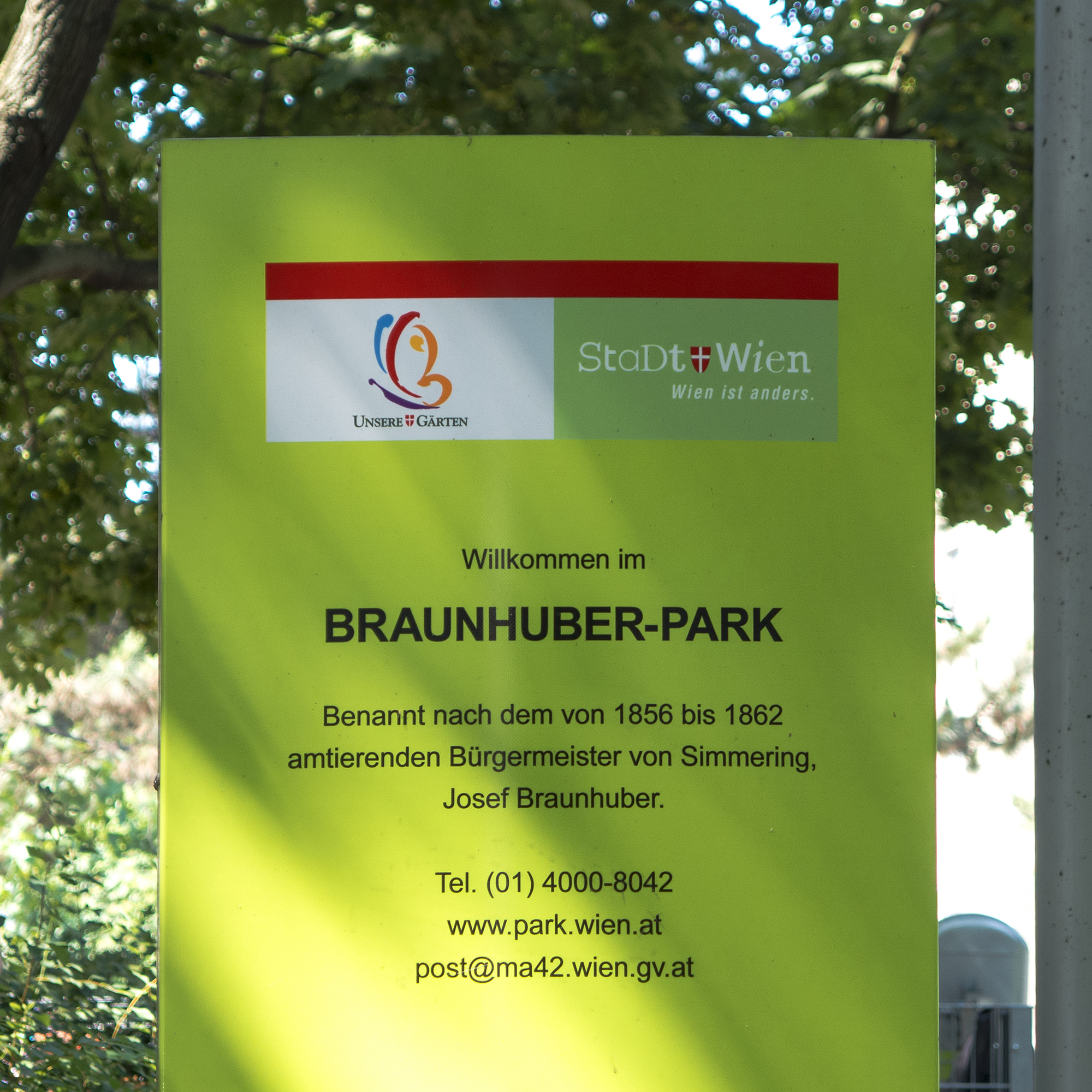 Braunhuberpark in Wien 11